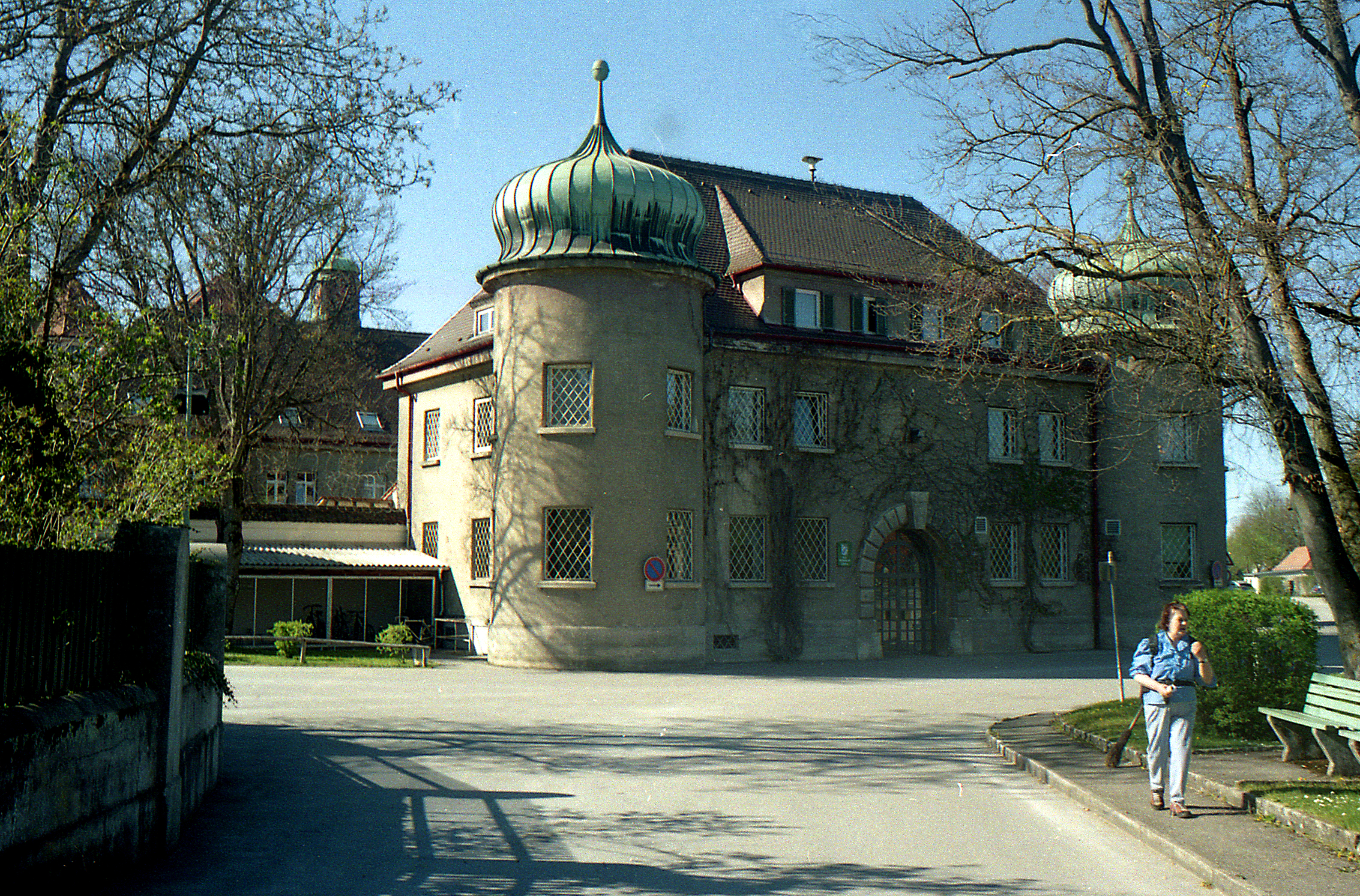 Landsberg.Jail